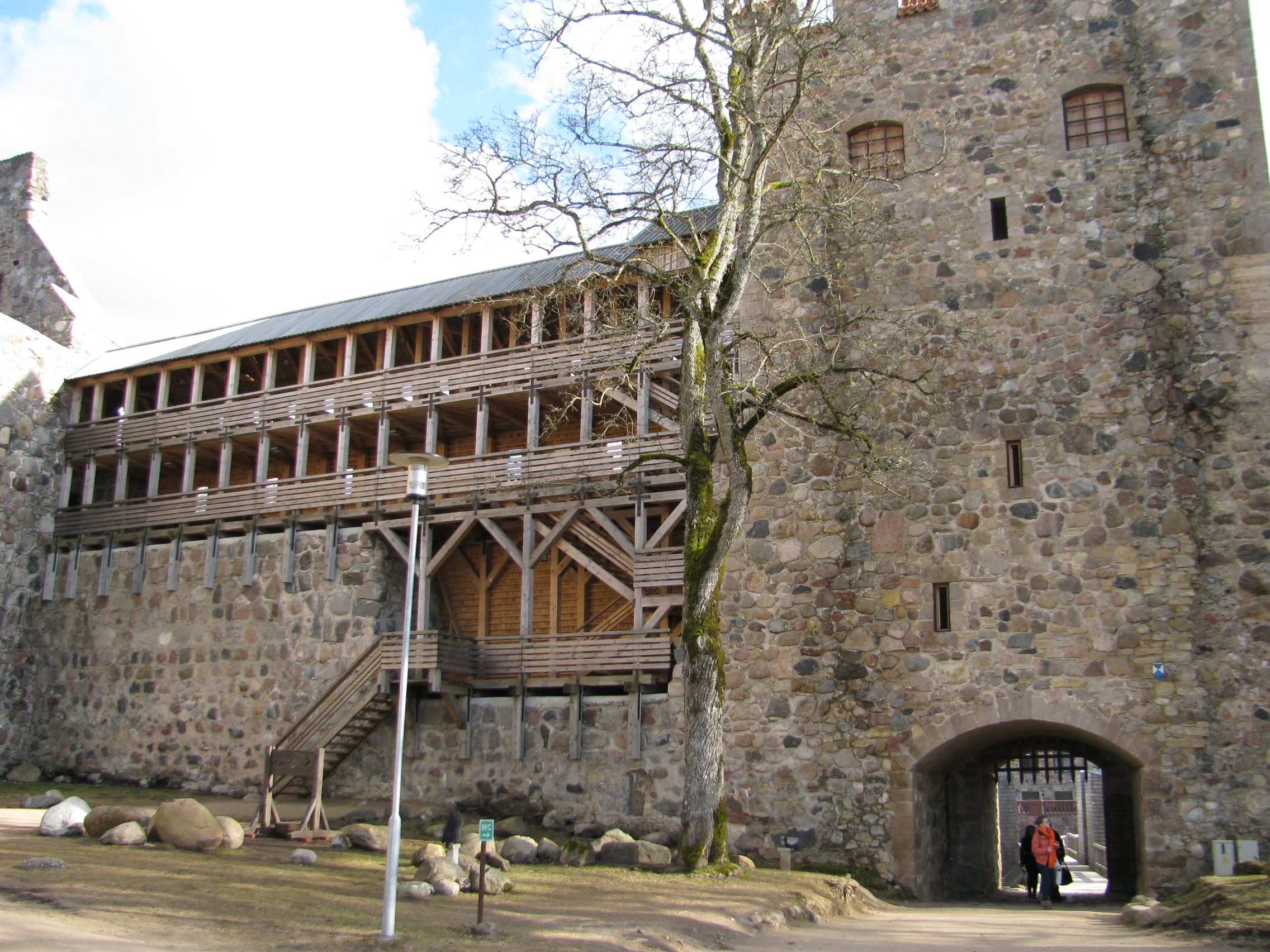 Siguldas pilsdrupas, Sigulda